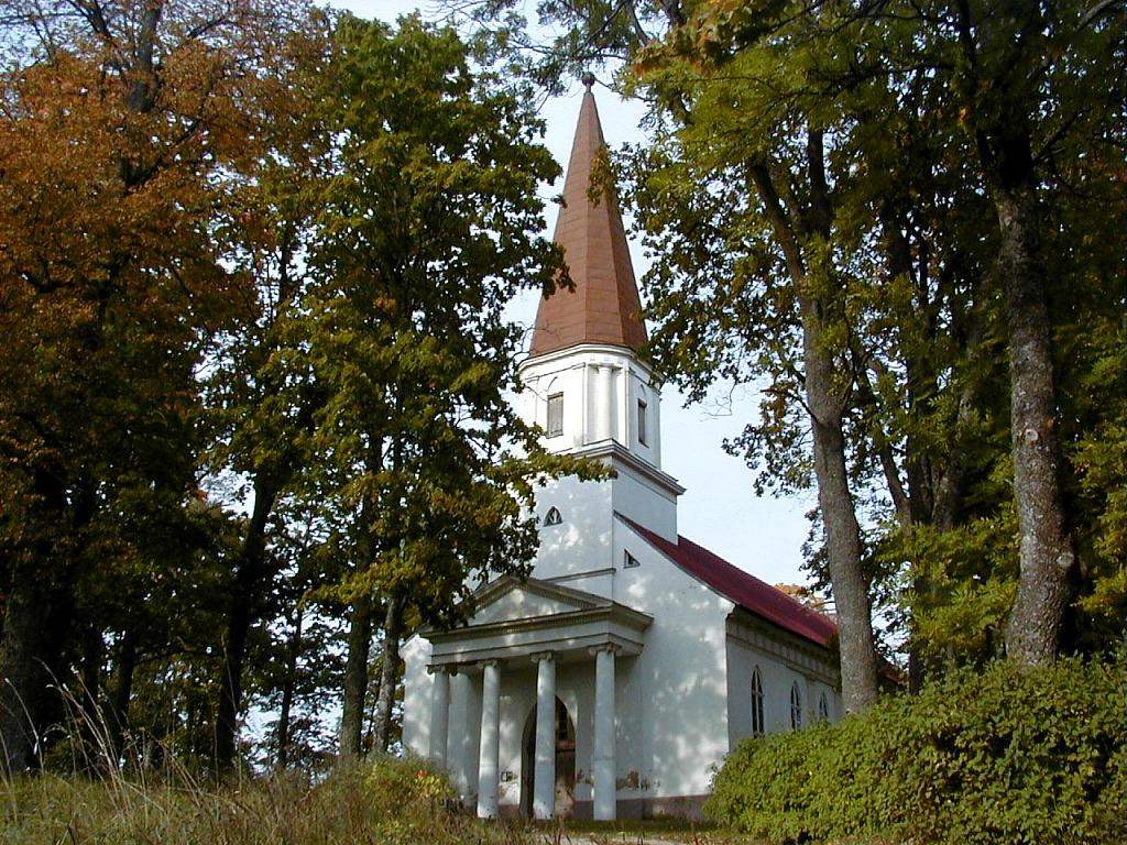 Tirzas baznīca 2001-09-21